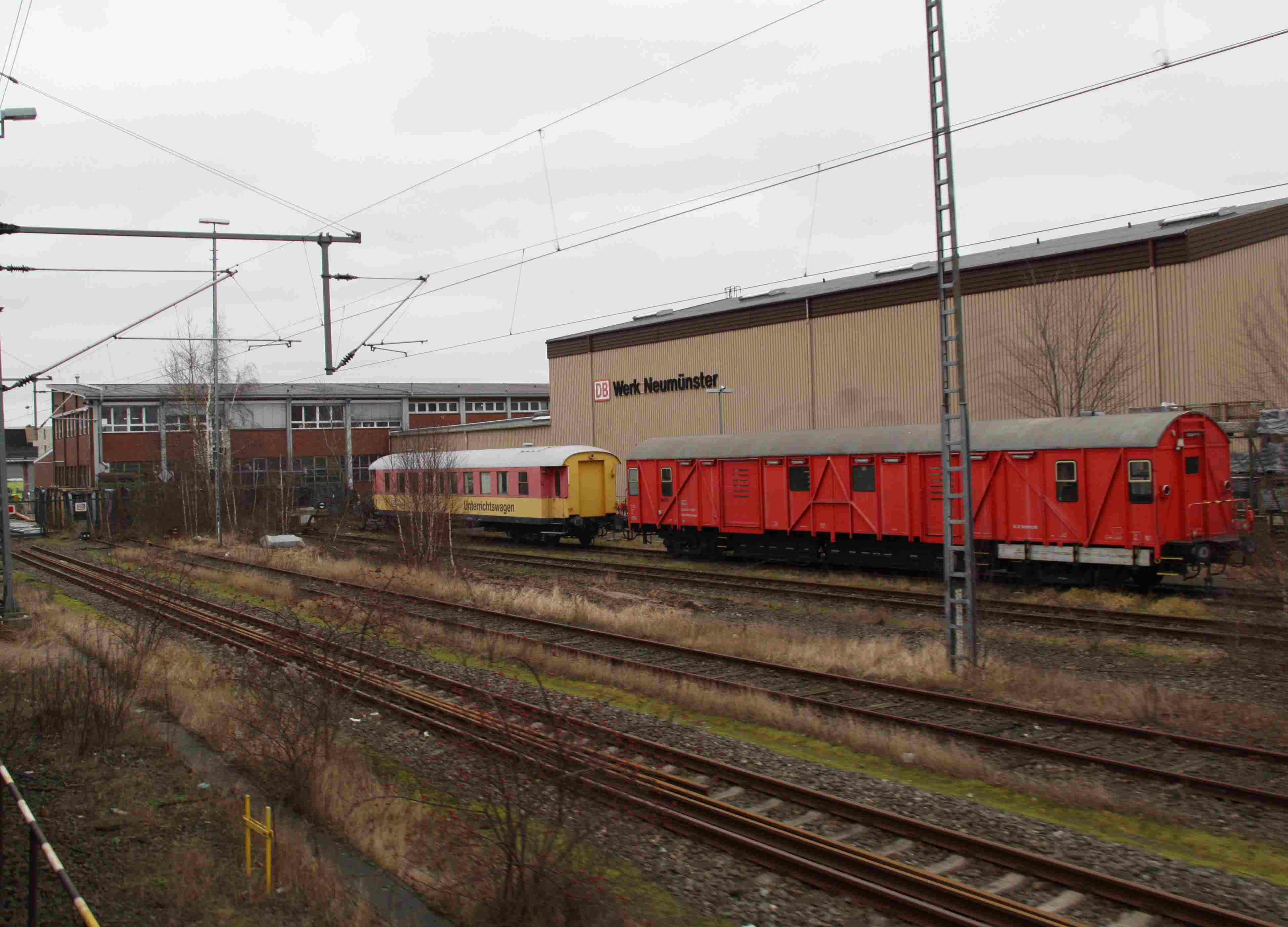 Ausbesserungswerk Neumünster